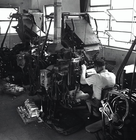 דפוס "הארץ" בתל-אביב